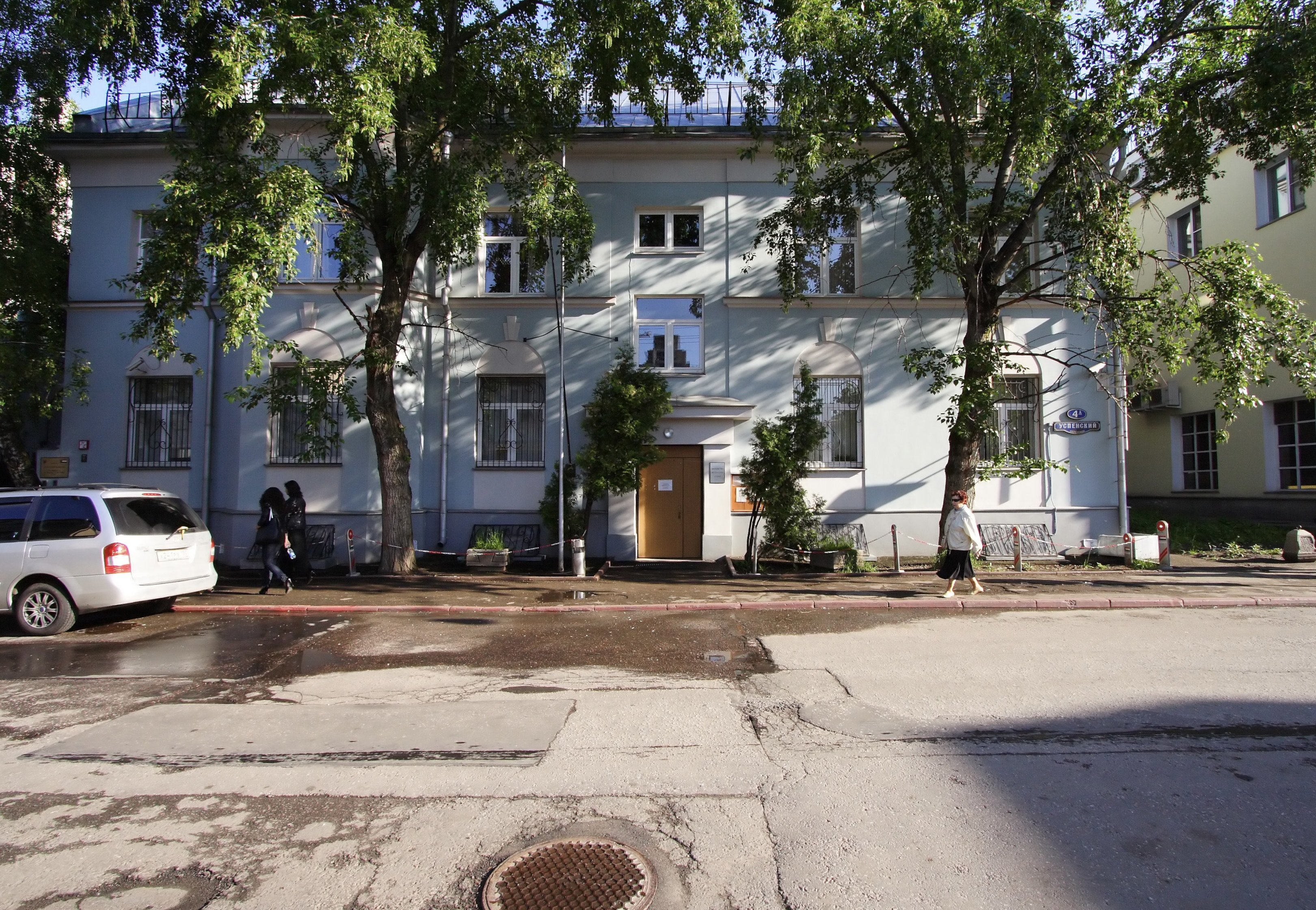 Консульство Судана в Москве